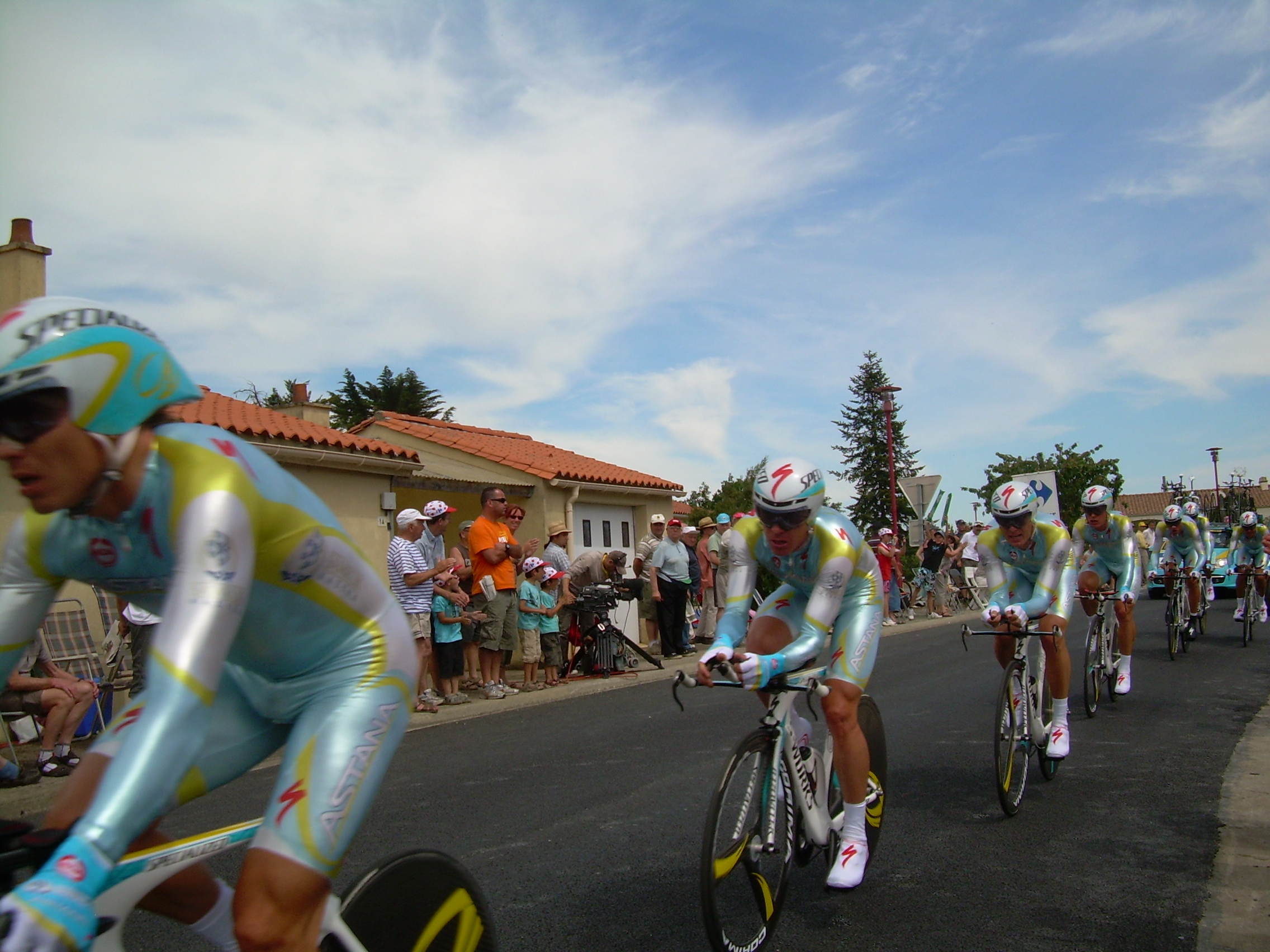 Équipe cycliste Astana durant la seconde étape du Tour de France 2011